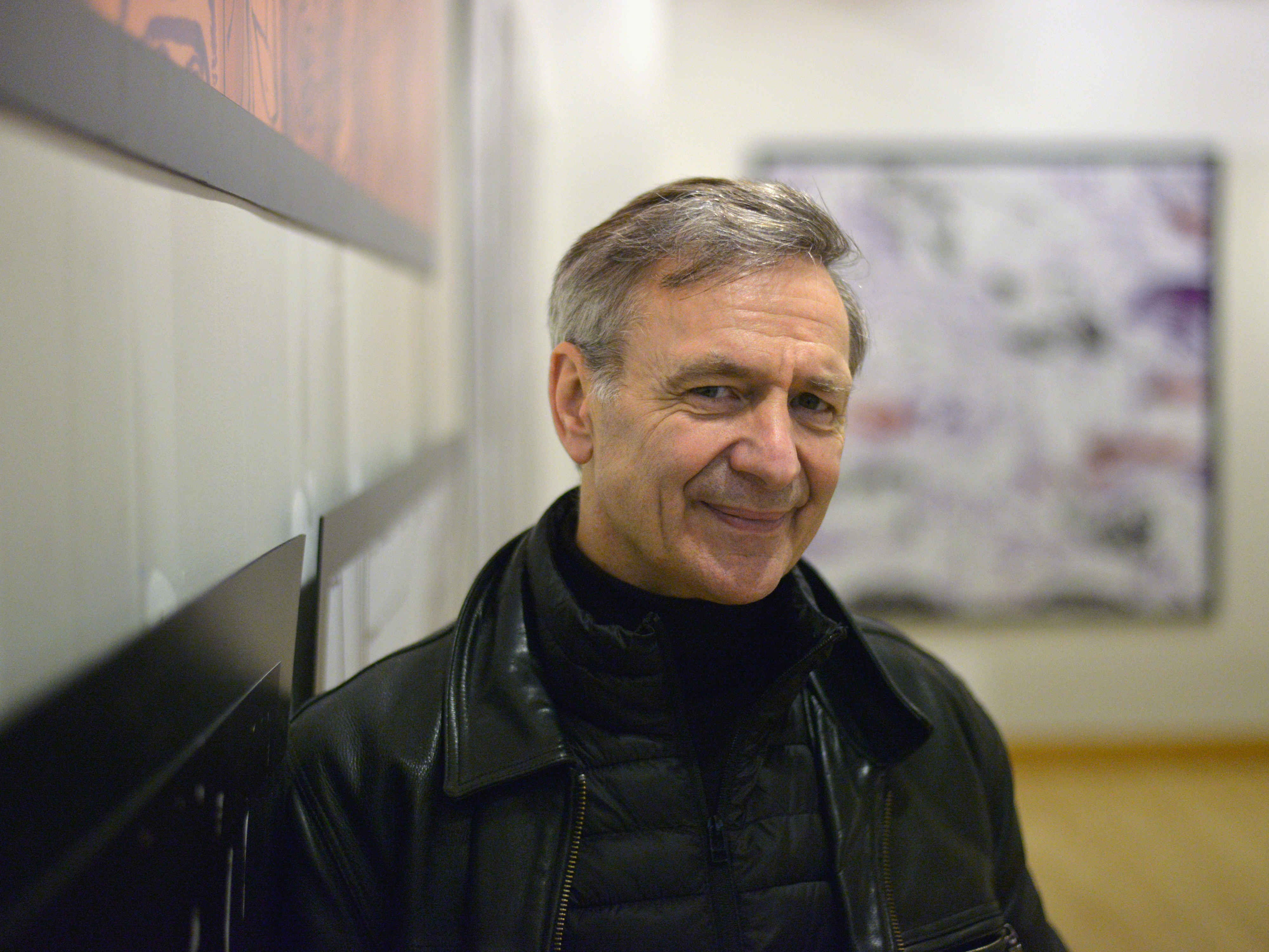 Le dessinateur français François Boucq au Festival d'Angoulême 2015.